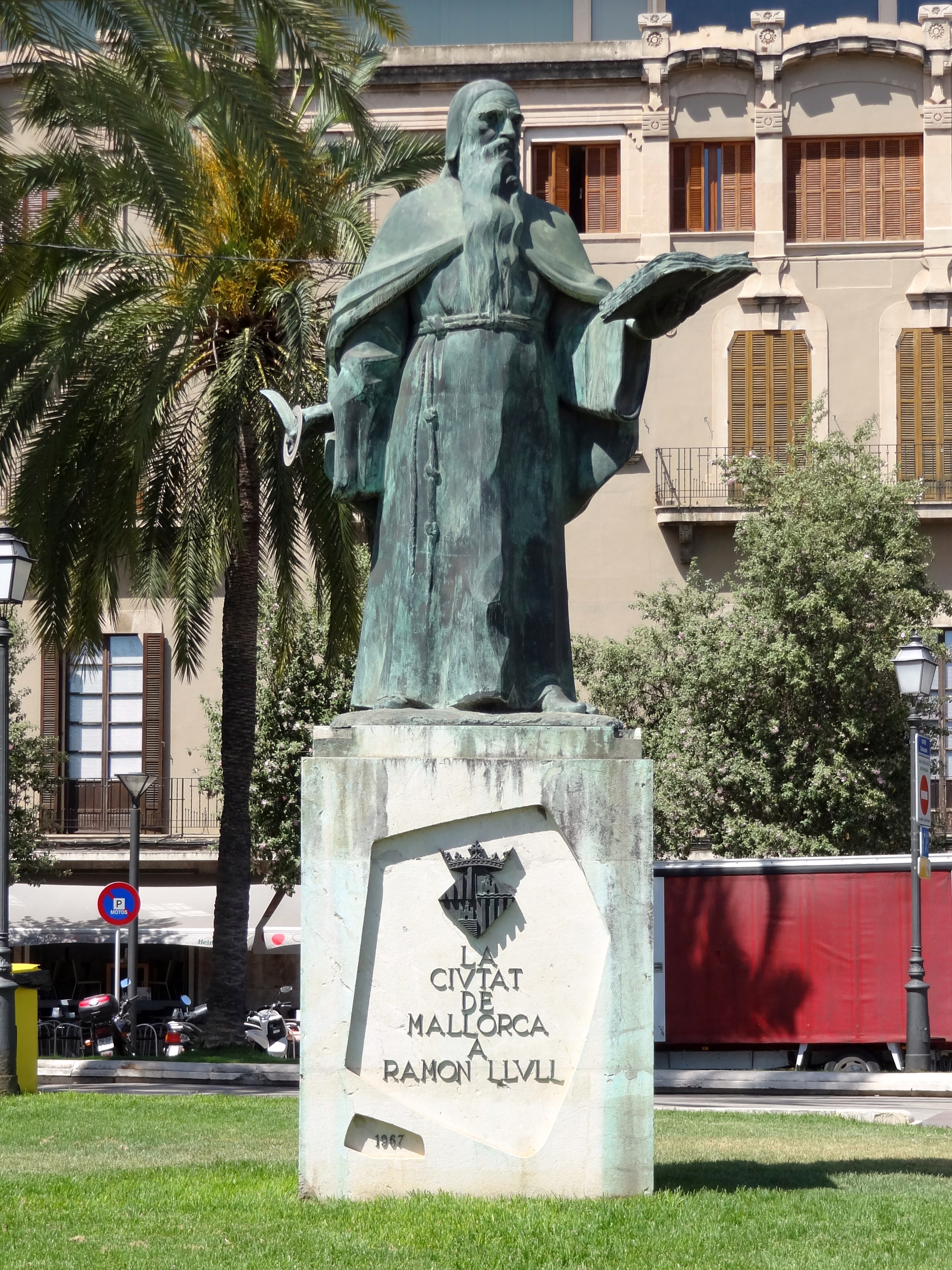 Denkmal für Ramon Llull in Palma, Mallorca, Spanien